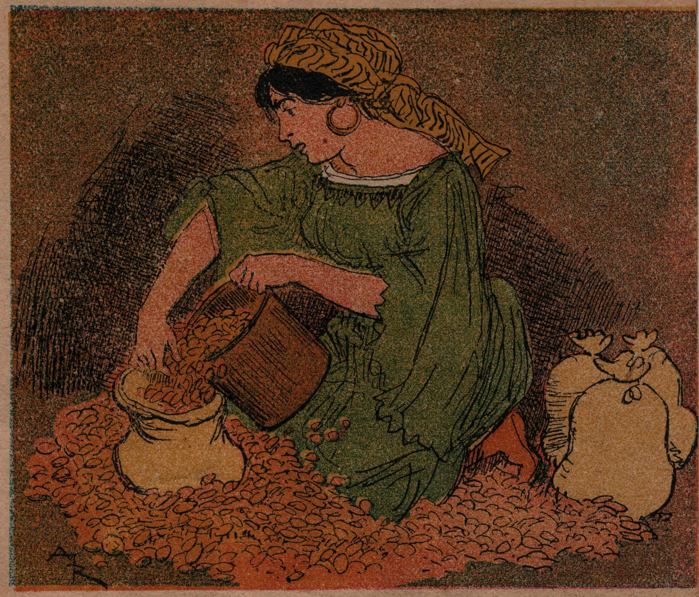 Illustration d'Albert Robida d'Ali-Baba et les quarante voleurs